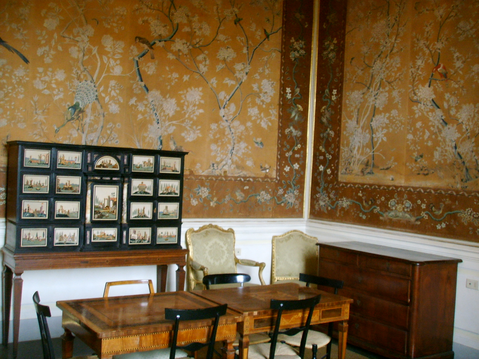 Villa_di_Poggio_Imperiale, Stanze_cinesi